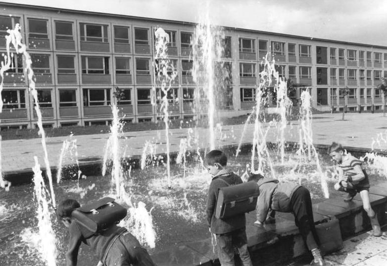 Frankfurt/Oder, Springbrunnen ADN-ZB Link 1.2.72 Frankfurt-Oder: Der Bezirk Frankfurt-Oder war ein Agrargebiet Deutschlands, in dem vor 1945 noch Ein- und Dreiklassenschulen dominierten. Heute werden in diesem Bezirk, wie überall in der DDR, die Schüler an Allgemeinbildenden Polytechnischen Oberschulen unterrichtet. Moderne, zweckmäßige gestaltete Schulgebäude bestimmen mit das Gesicht der Bezirkshauptstadt.